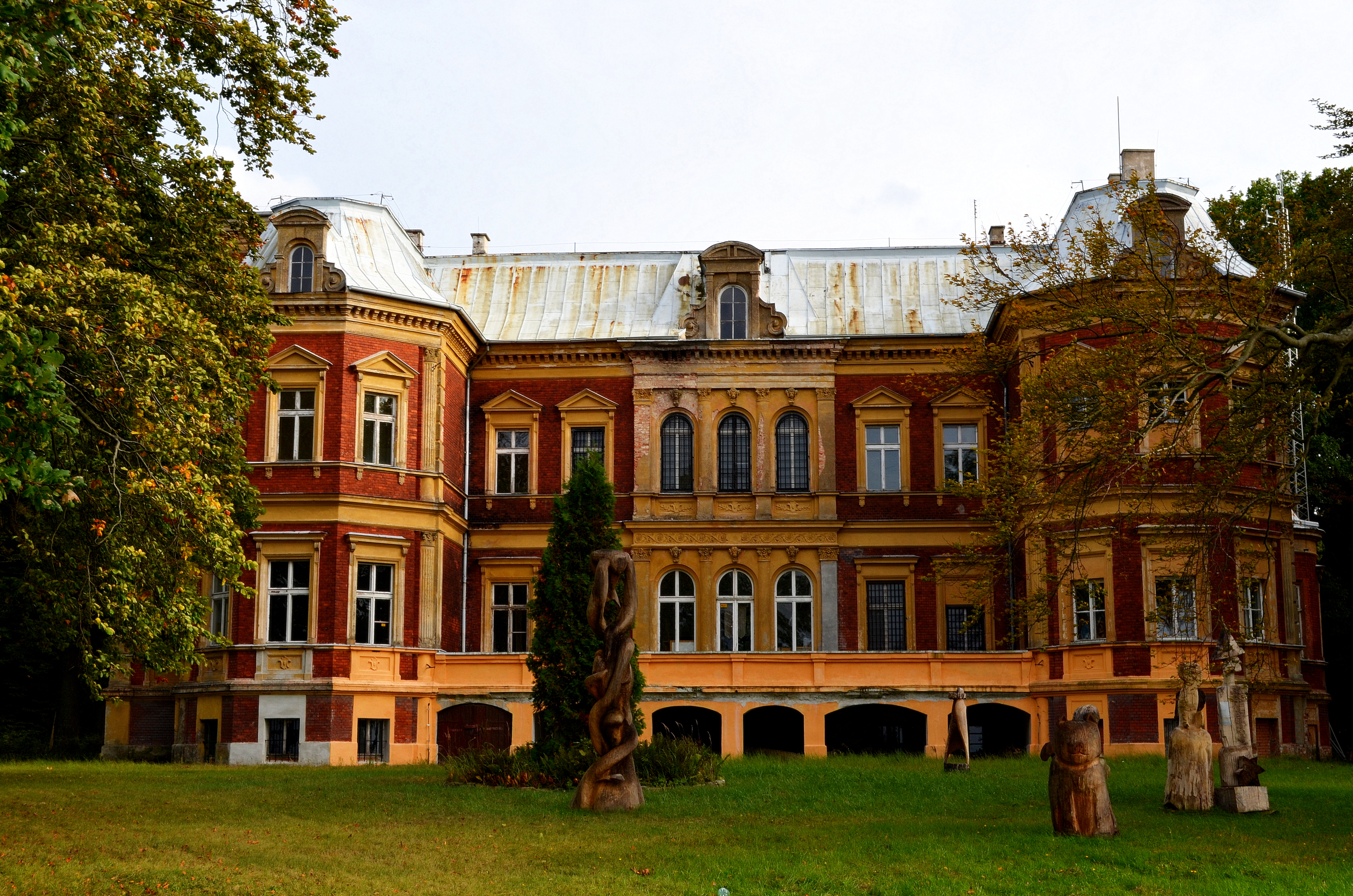 Nowe Warpno, pałac, 1898